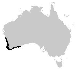 Carte de la zone de disribution d'Heleioporus eyrei